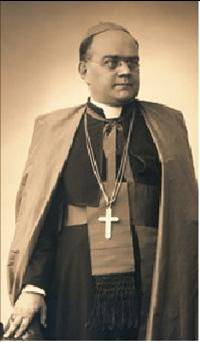 Picture of Bishop Zoltán Meszlényi